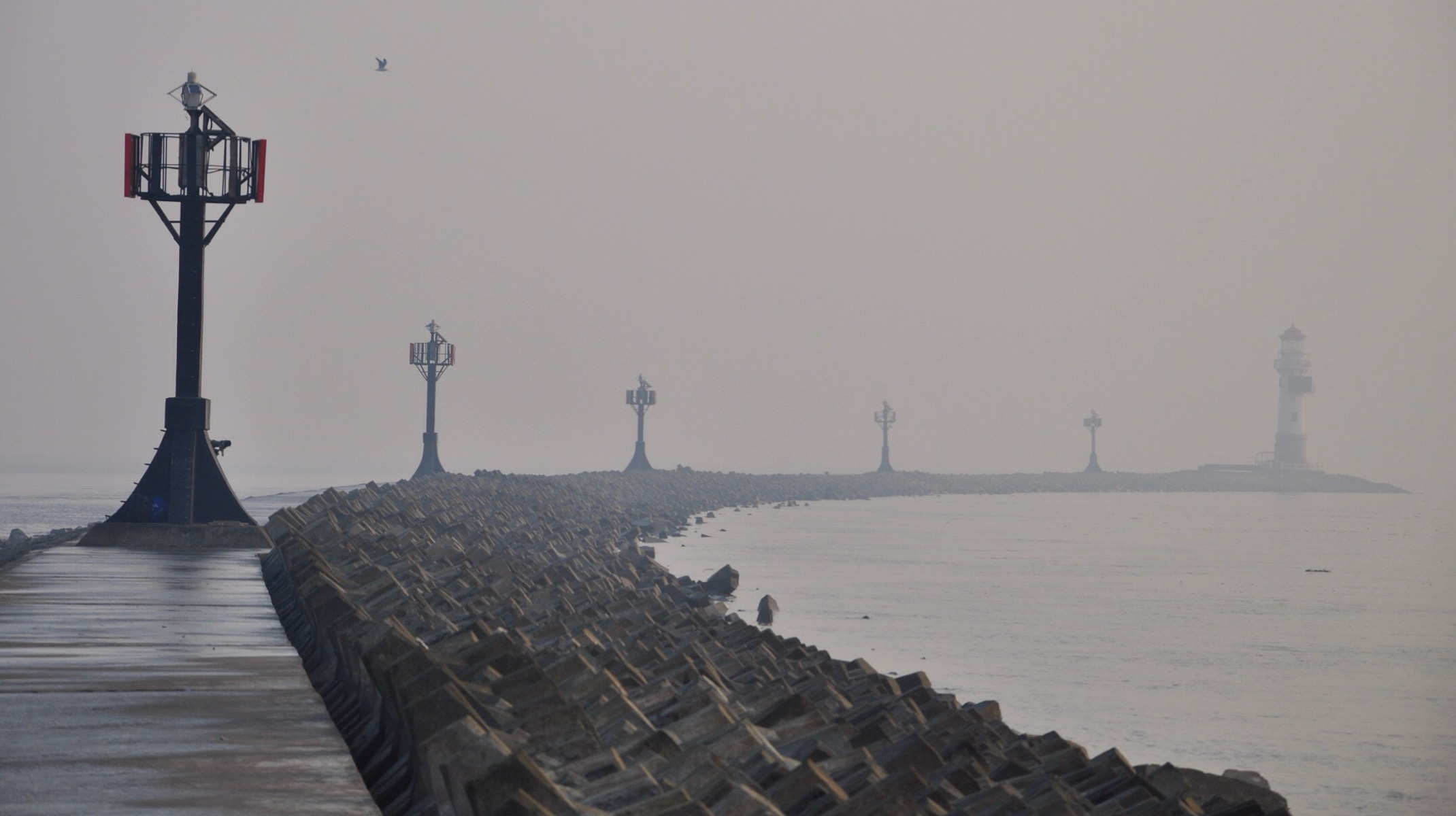 吴淞左导堤